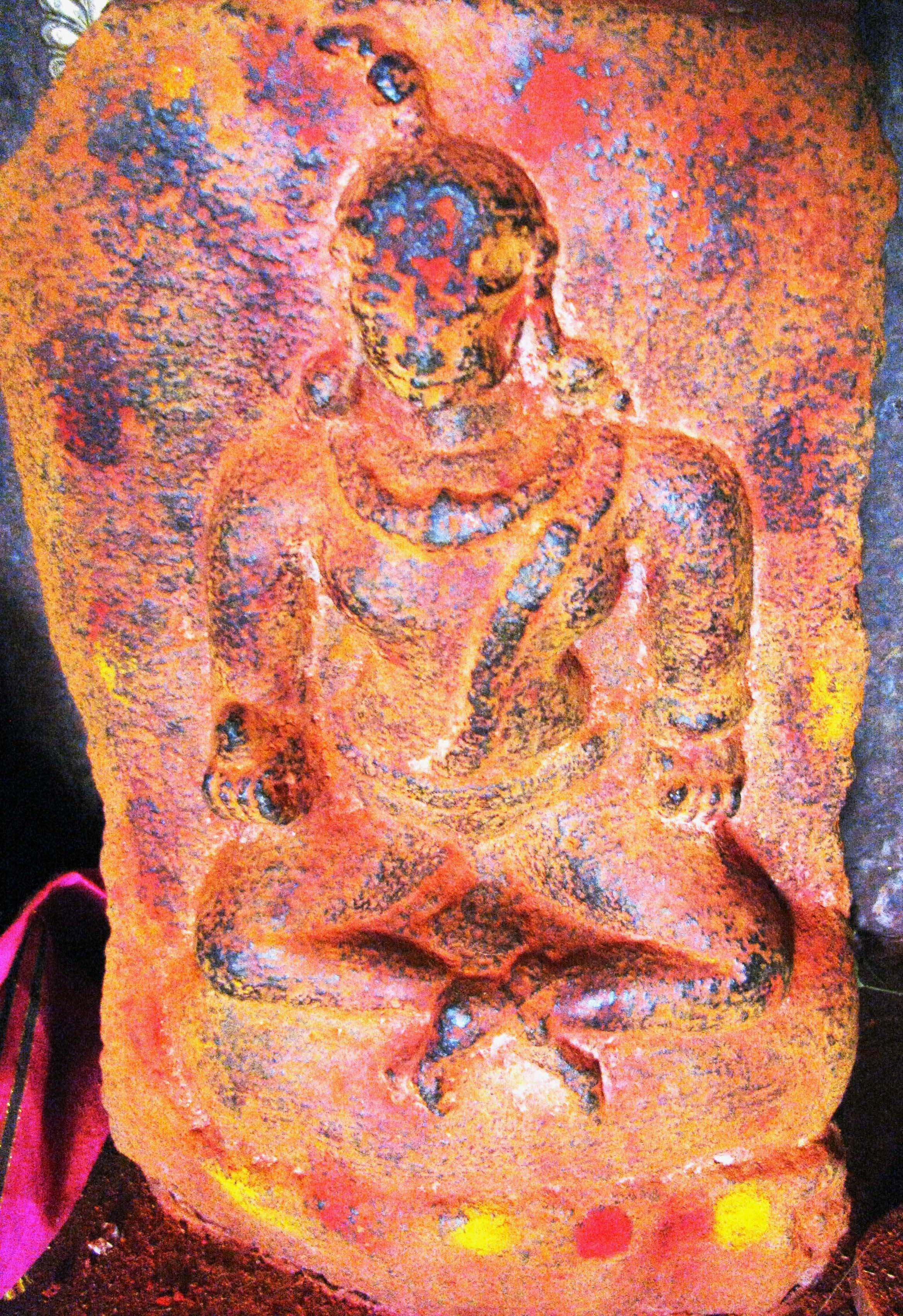 పాశుపతానికి చెందిన ఒక వీరశైవాచార్యుడు